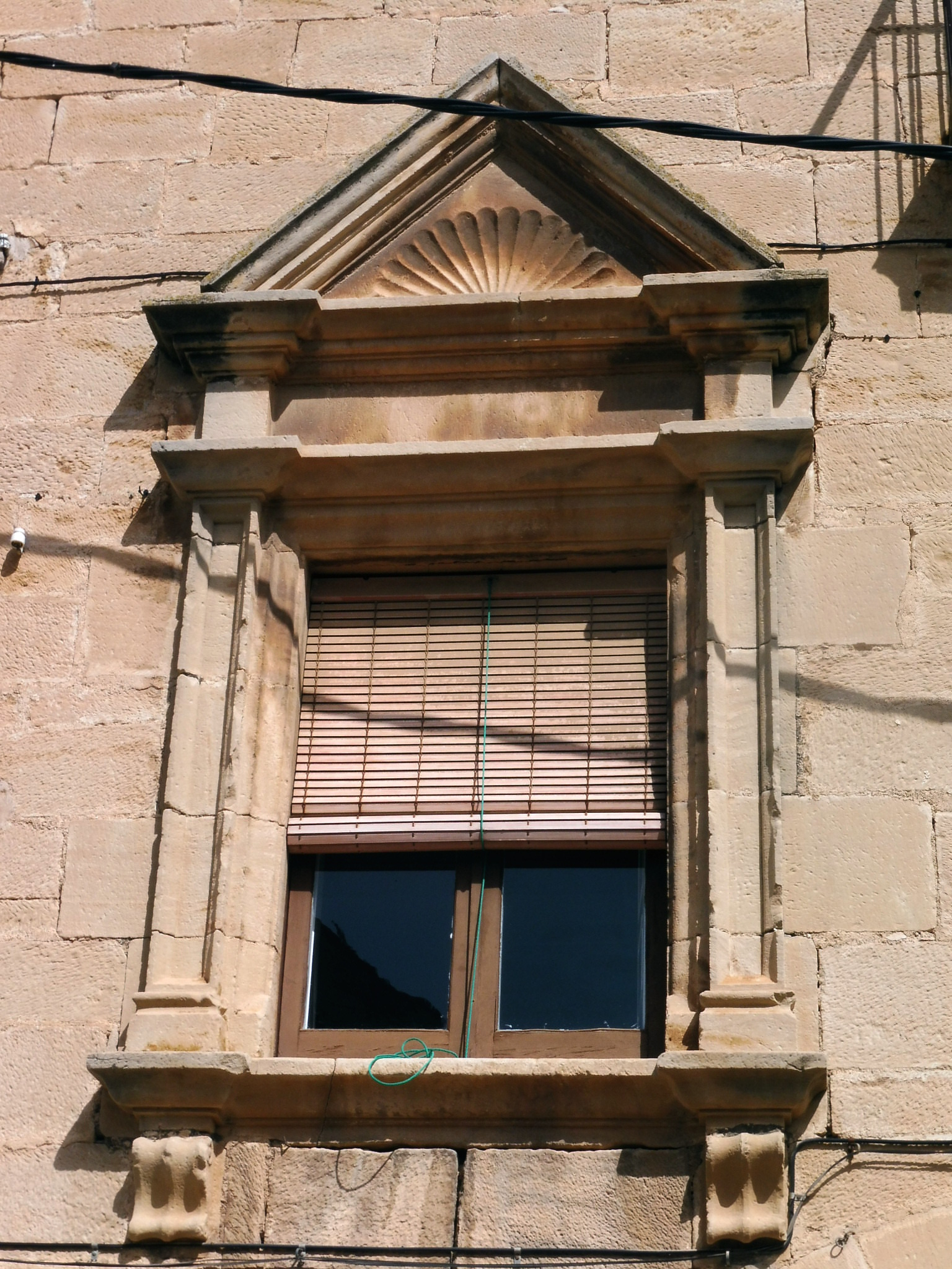 Cal Roc de Belianes